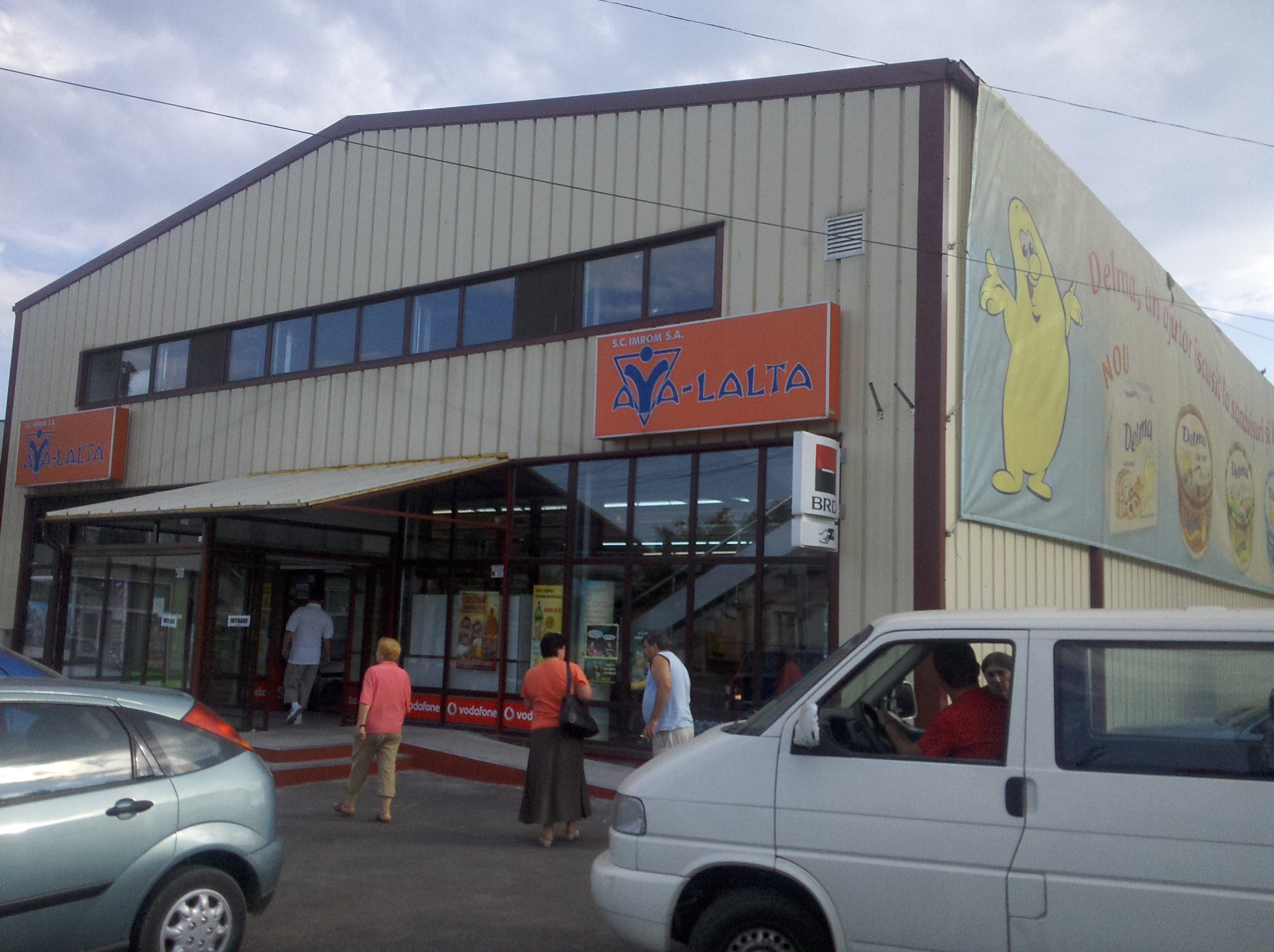 supermagazinul Aya-laltă din Roman, Neamţ